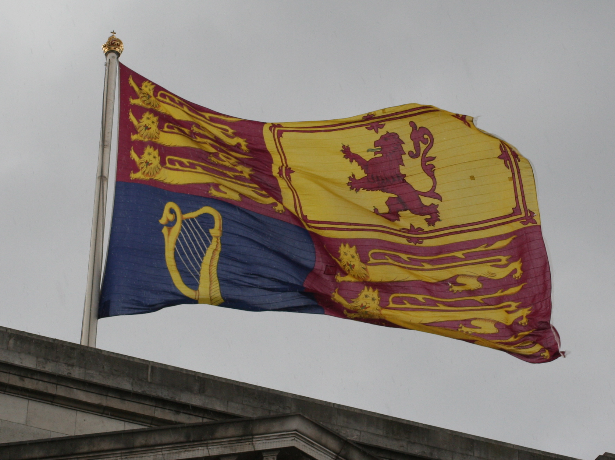 Étendard royal